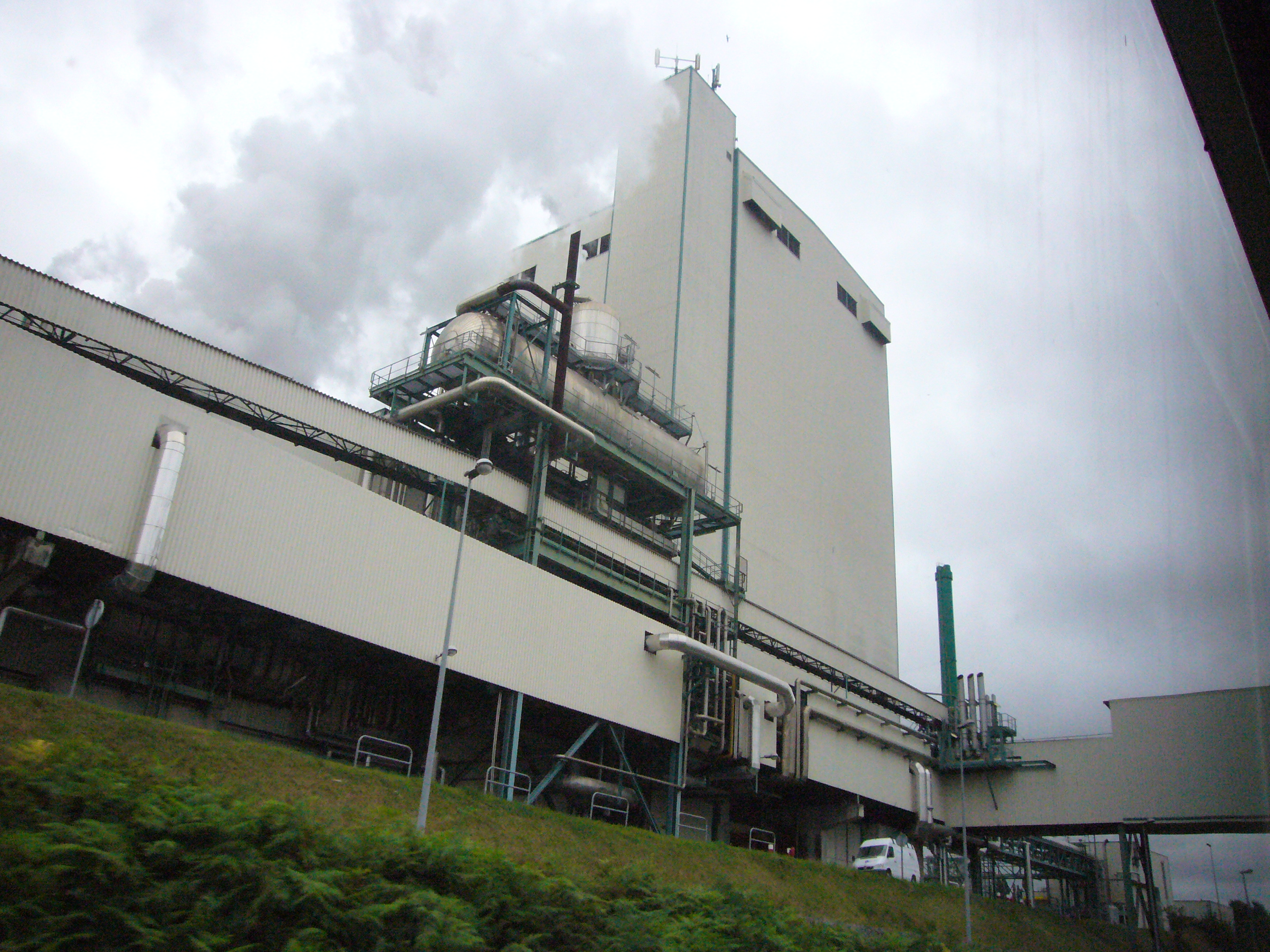 Usine International Paper à Saillat-sur-Vienne (Haute-Vienne)